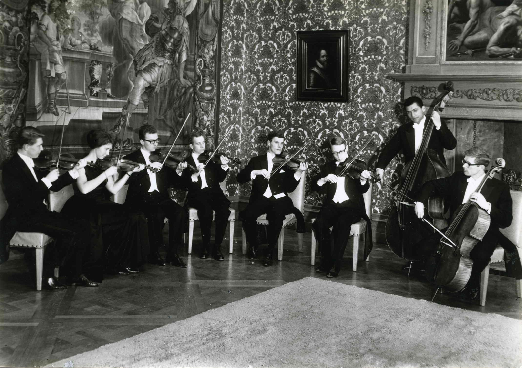 Een concert in het concertgebouw door "'Les Solistes de Liège" ter gelegenheid van het 8e lustrum van het Nijmeegs studentencorps "Carolus Magnus". Collectie: Uijen, A.F. 1902-1995 (Studiezaal Nijmegen, F84413).